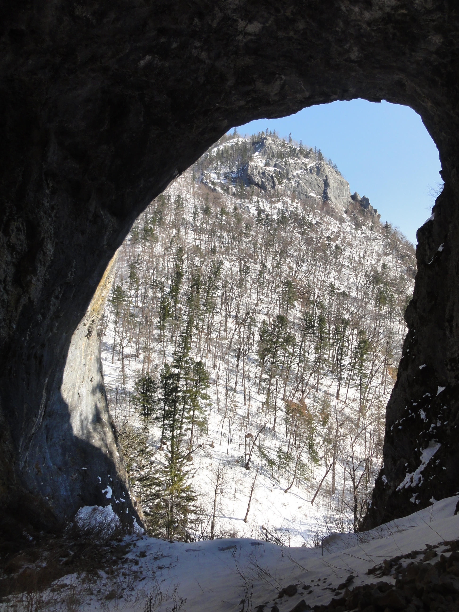 Выход из пещеры